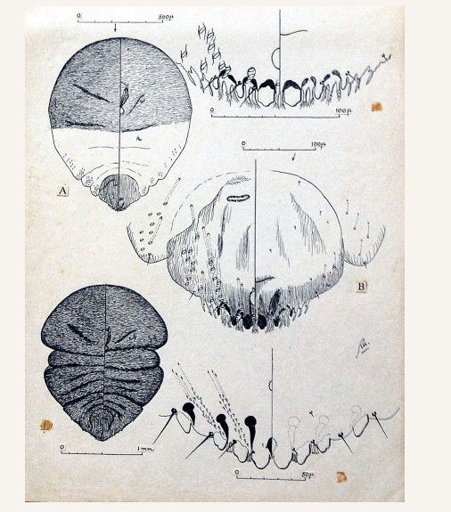 Dessin de Raymond Mamet accompagnant la description d'une cochenille (Homoptera, Coccoidea).